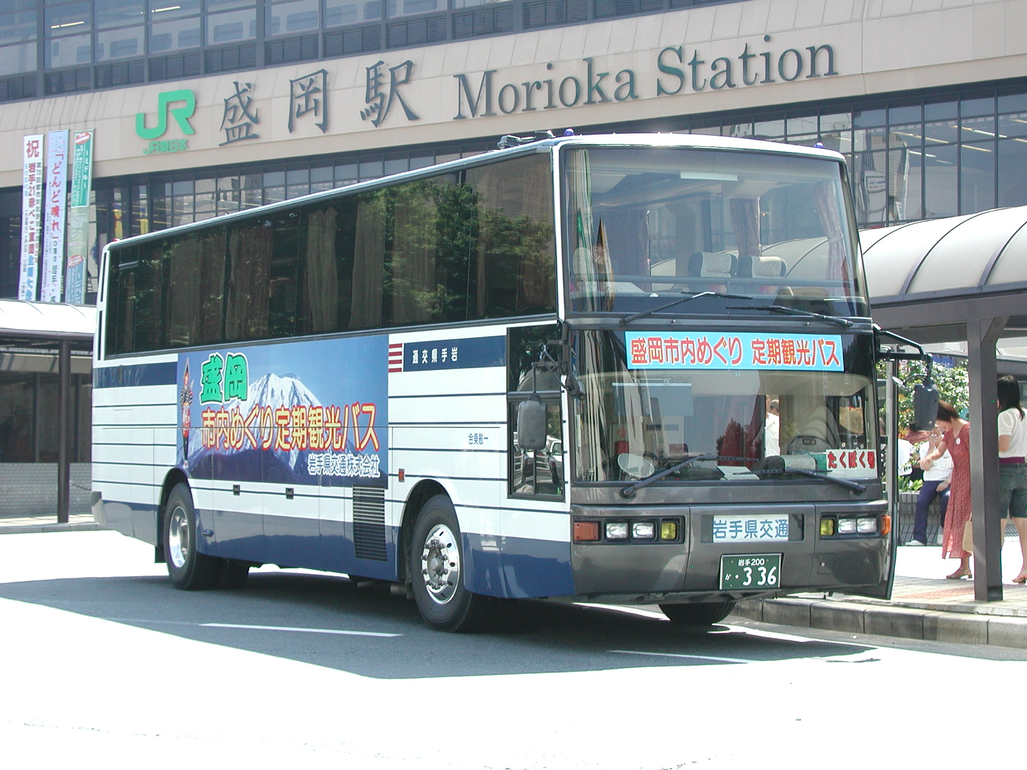 岩手県交通 観光貸切塗装（いすゞ・スーパークルーザーUFC：P-LV719R）：盛岡市内めぐり定期観光バス運用 盛岡駅東口にて